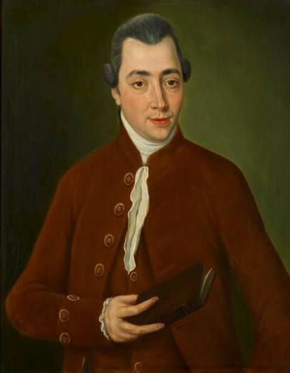 Jan Haak Oosting